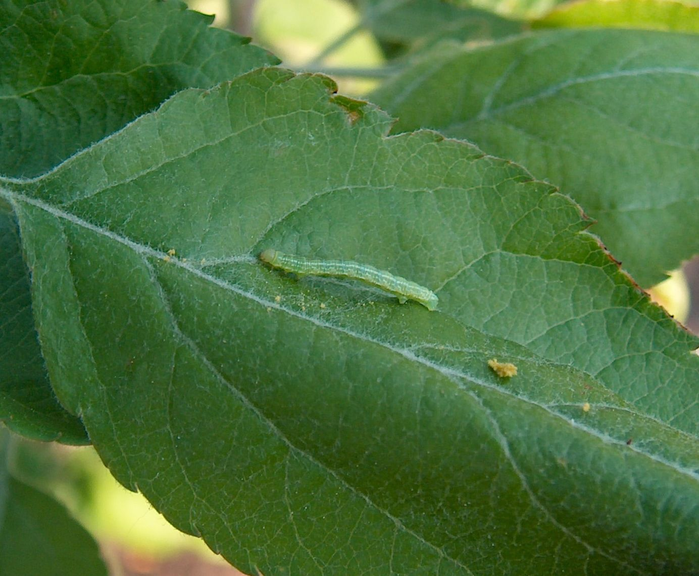 Raupe des Kleinen Frostspanners (Operophtera brumata) an einem Apfelbaum (Sorte Collina)